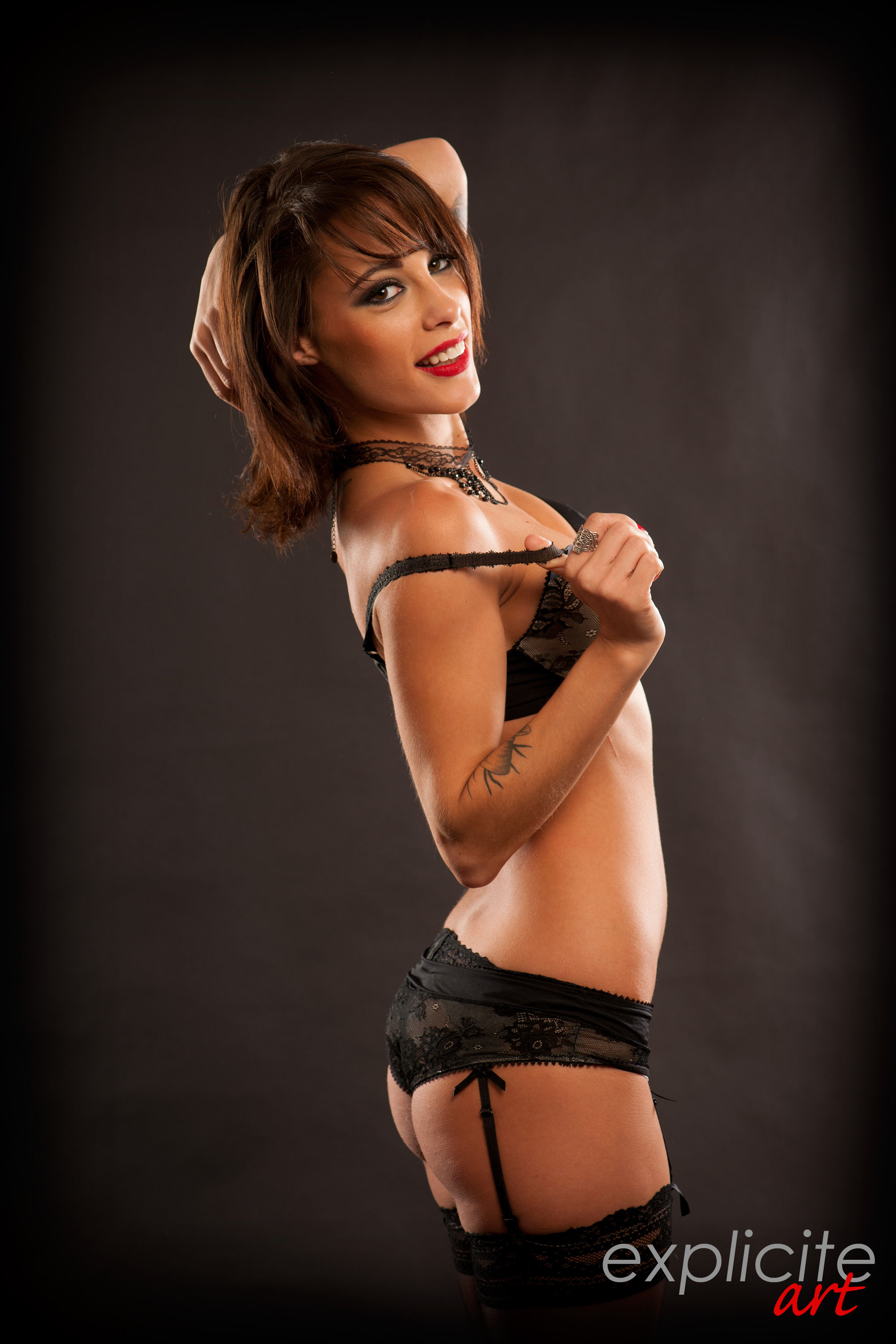 Nikita Bellucci par John B. Root